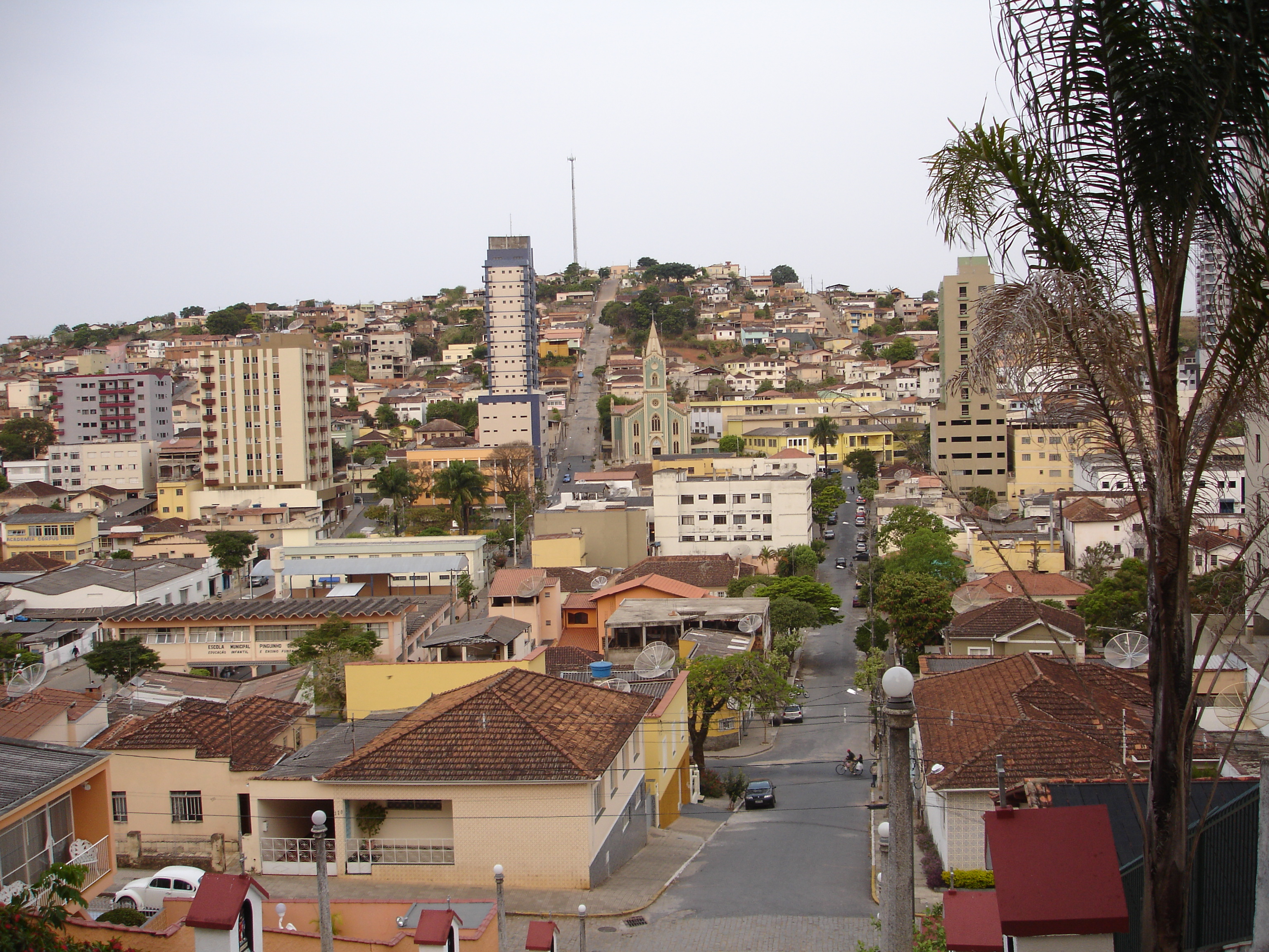 Cidade de Caxambu, Minas Gerais